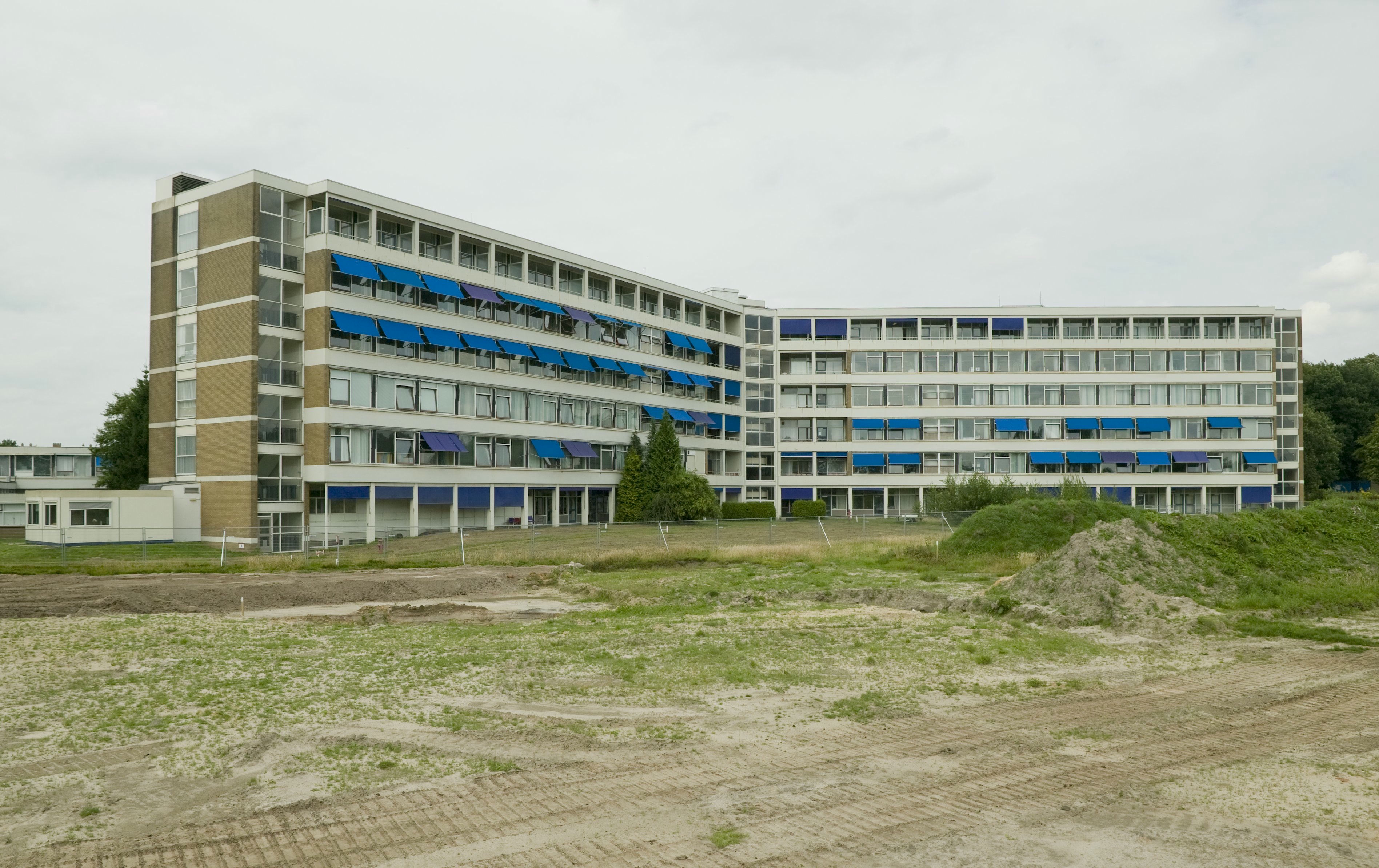 Martini Ziekenhuis: Overzicht van het ziekenhuis, zuidzijde (opmerking: Gefotografeerd voor Monumenten van Herrezen Nederland)